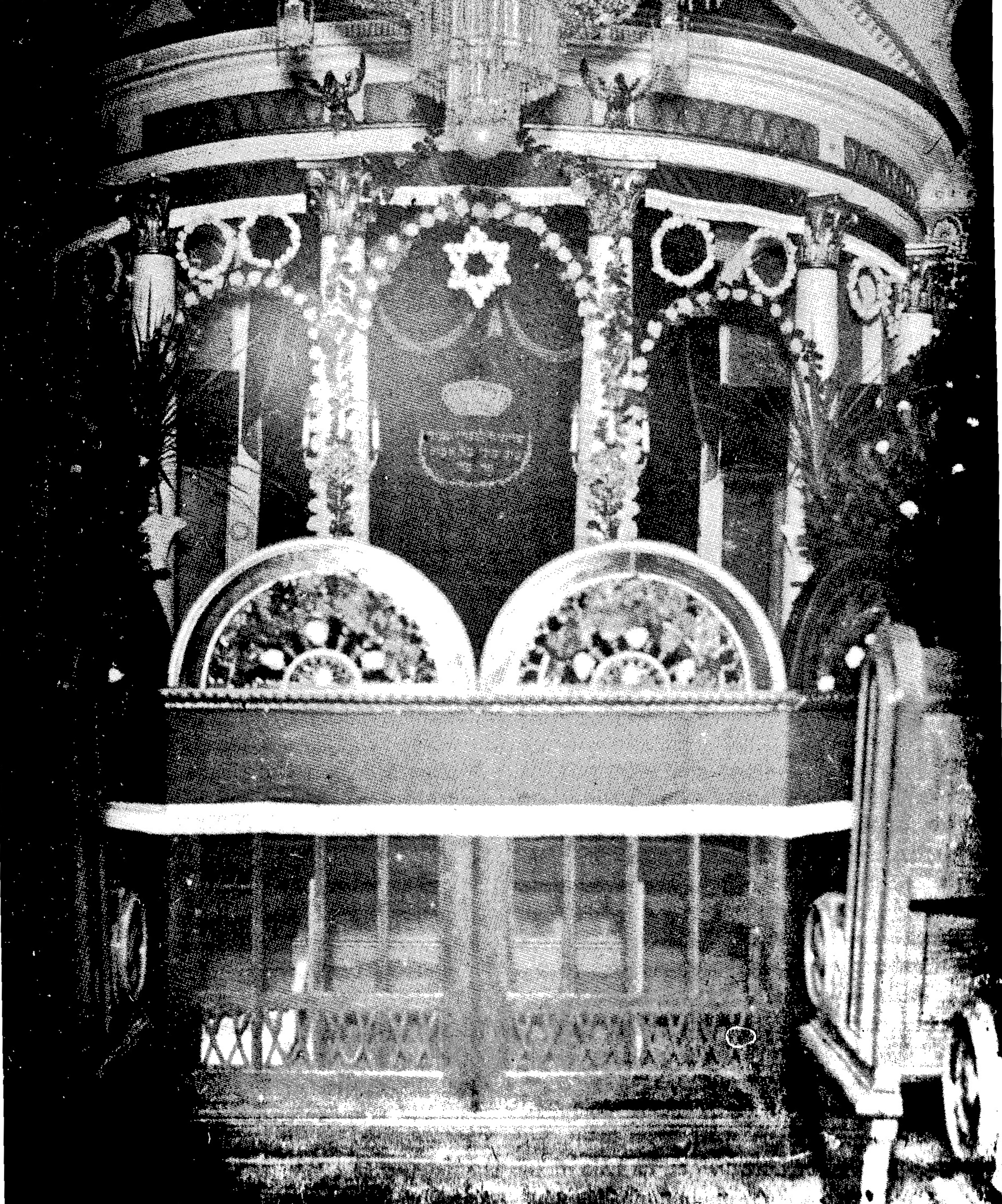 Innenansicht der Werler Synagoge vor 1938. Das Gebäude wurde 1938 zerstört.